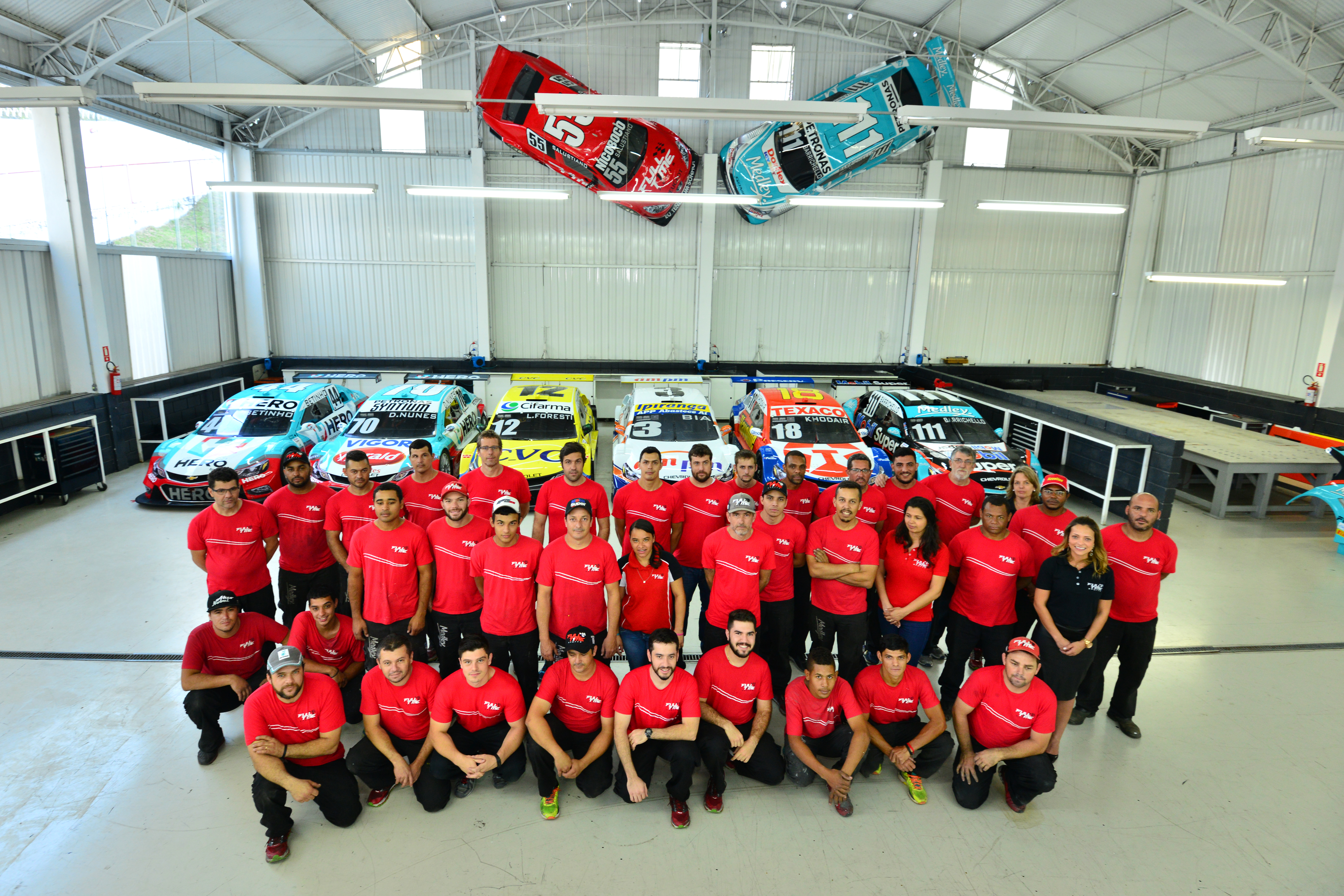 Time Full Time Localizado em Vinhedo, SP